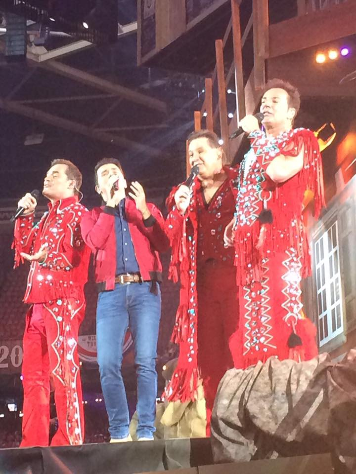 De vier toppers